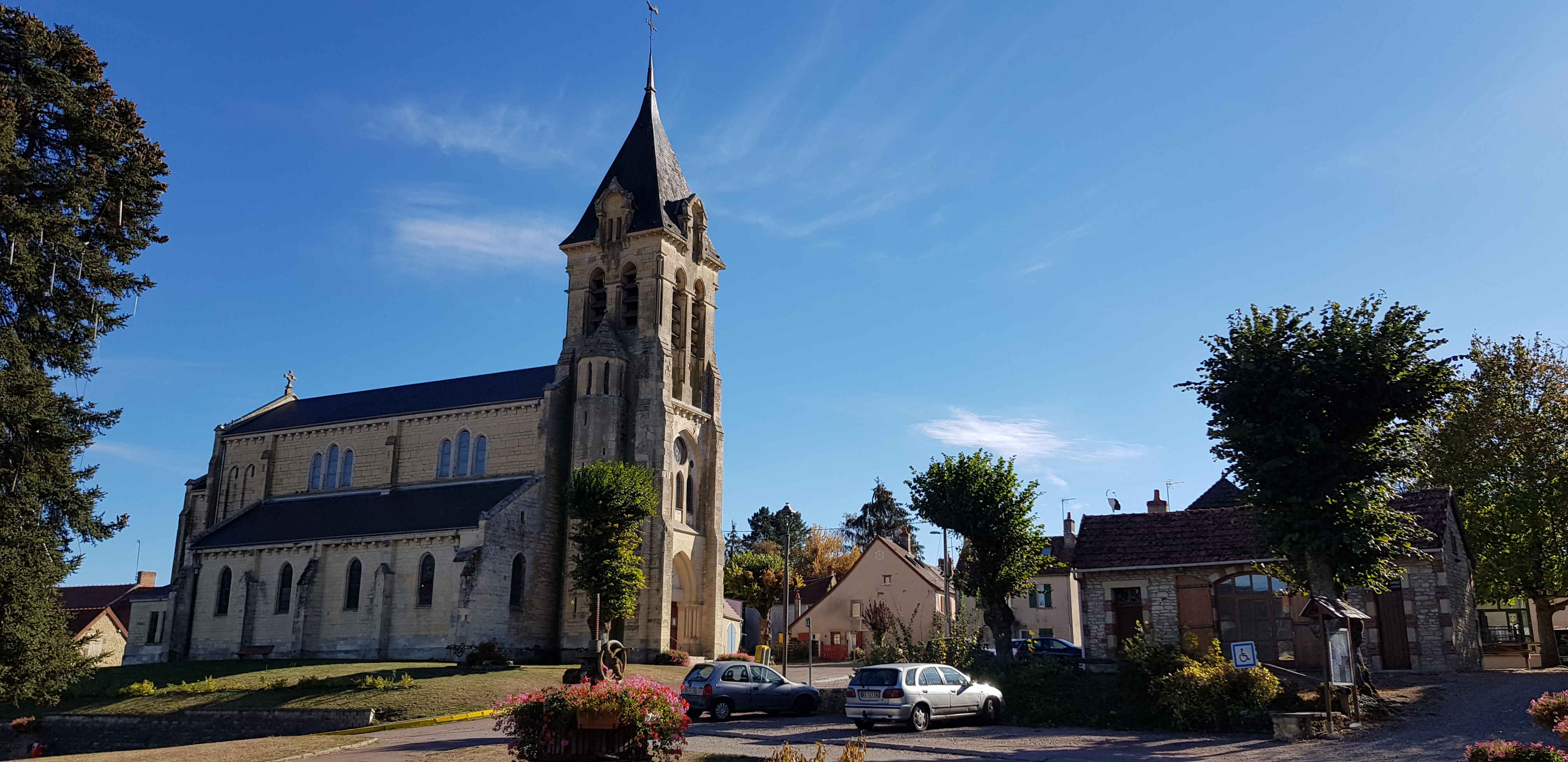 Eglise de Chaulgnes, Nièvre.